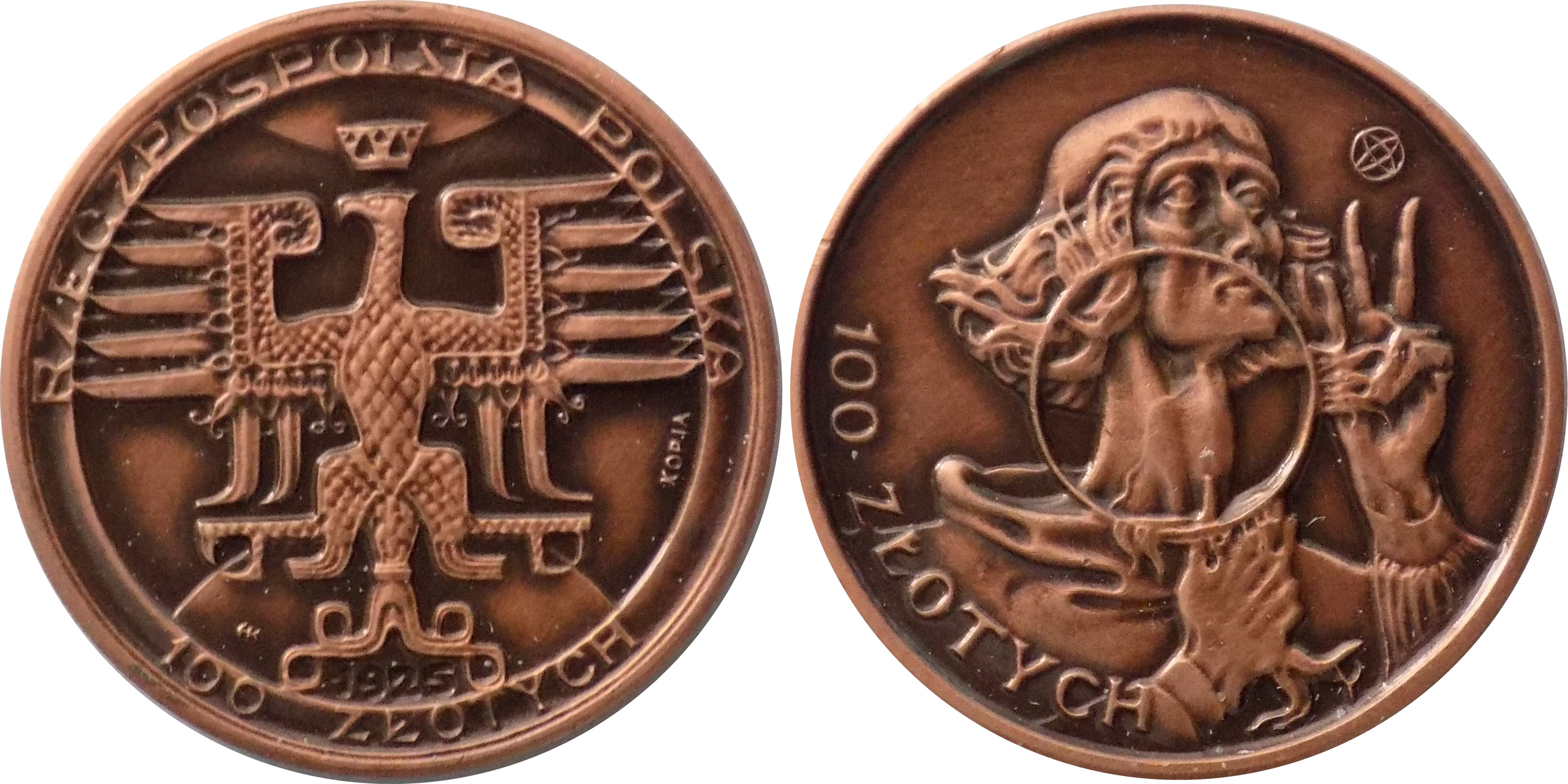 Replika 100 złotych 1925 Mikołaj Kopernik 20.5 mm miedź